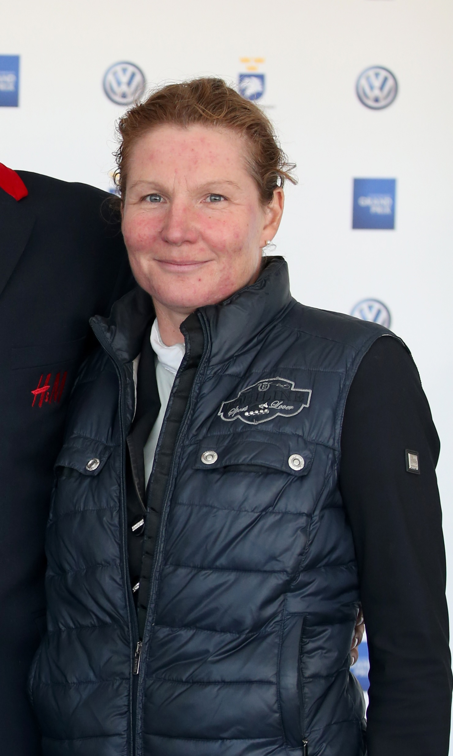 Den svenska hoppryttaren Helena Persson.